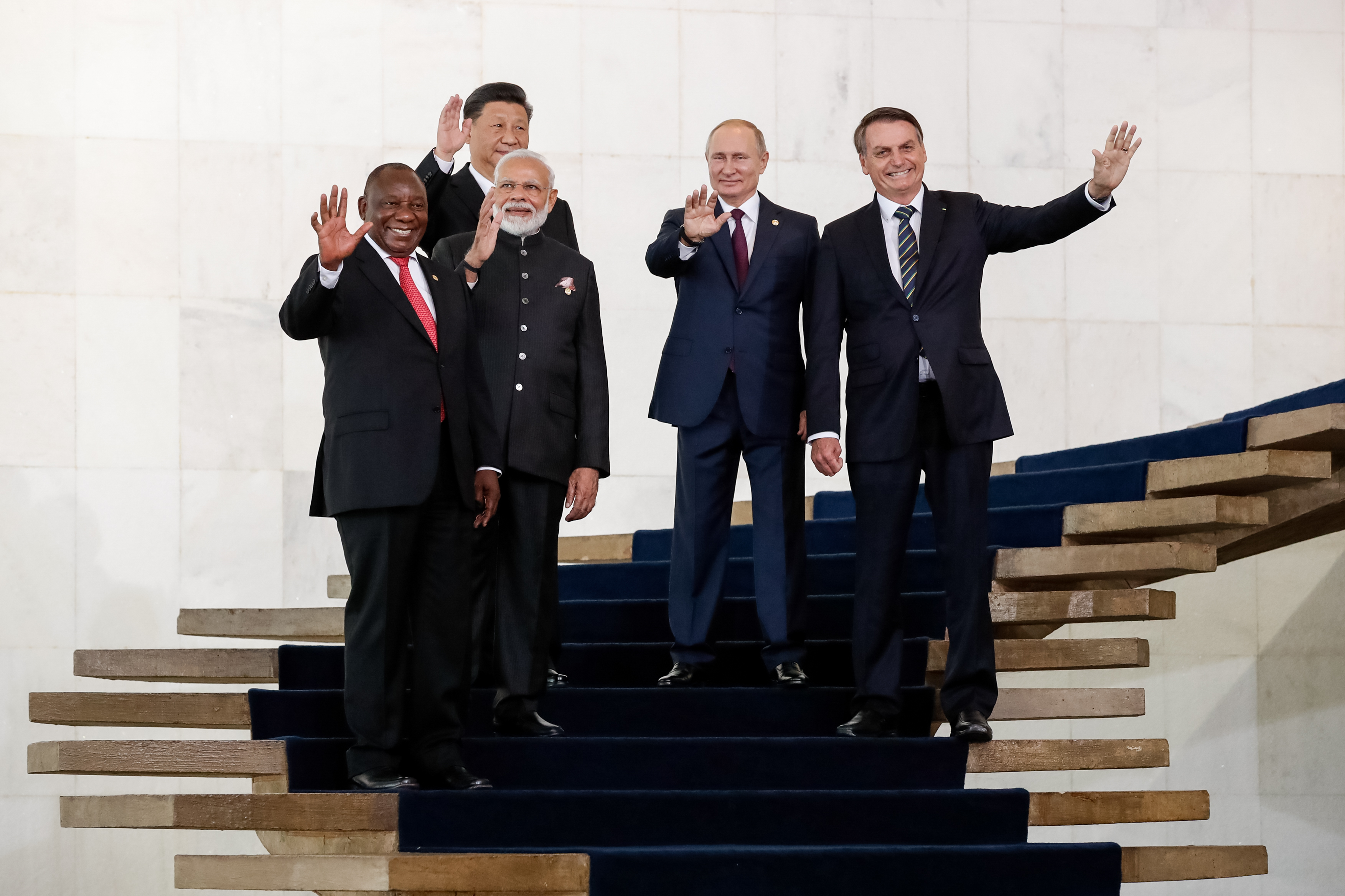 (Brasília - DF, 14/11/2019) Foto de Família com os líderes do BRICS.Foto: Alan Santos/PR